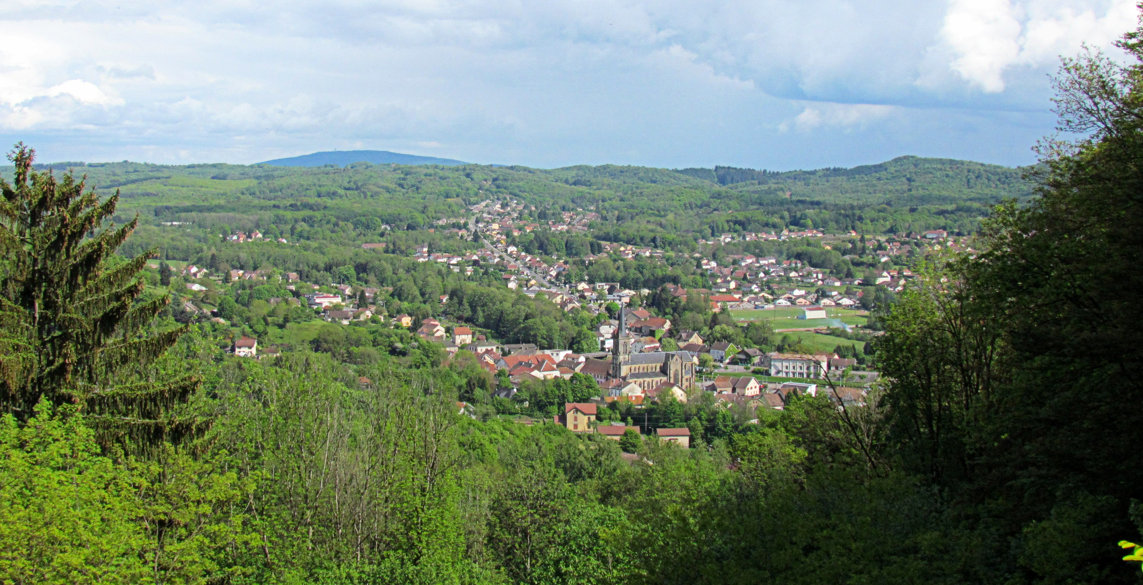 Vue générale sur Ronchamp # Haute-Saône (70) .